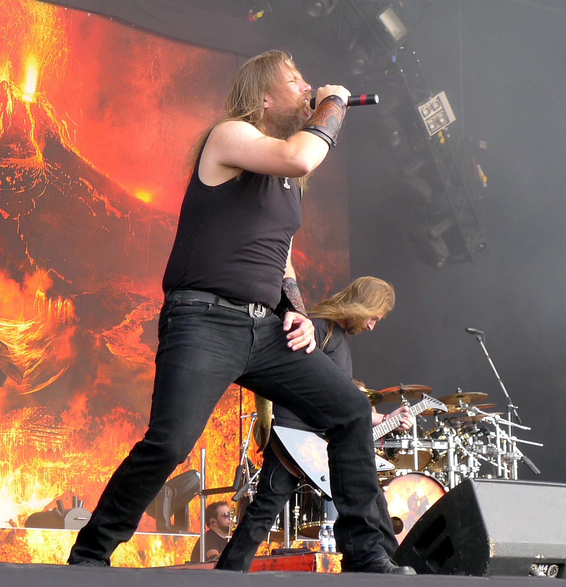 Amon Amarth live am Tuska Open Air 2011